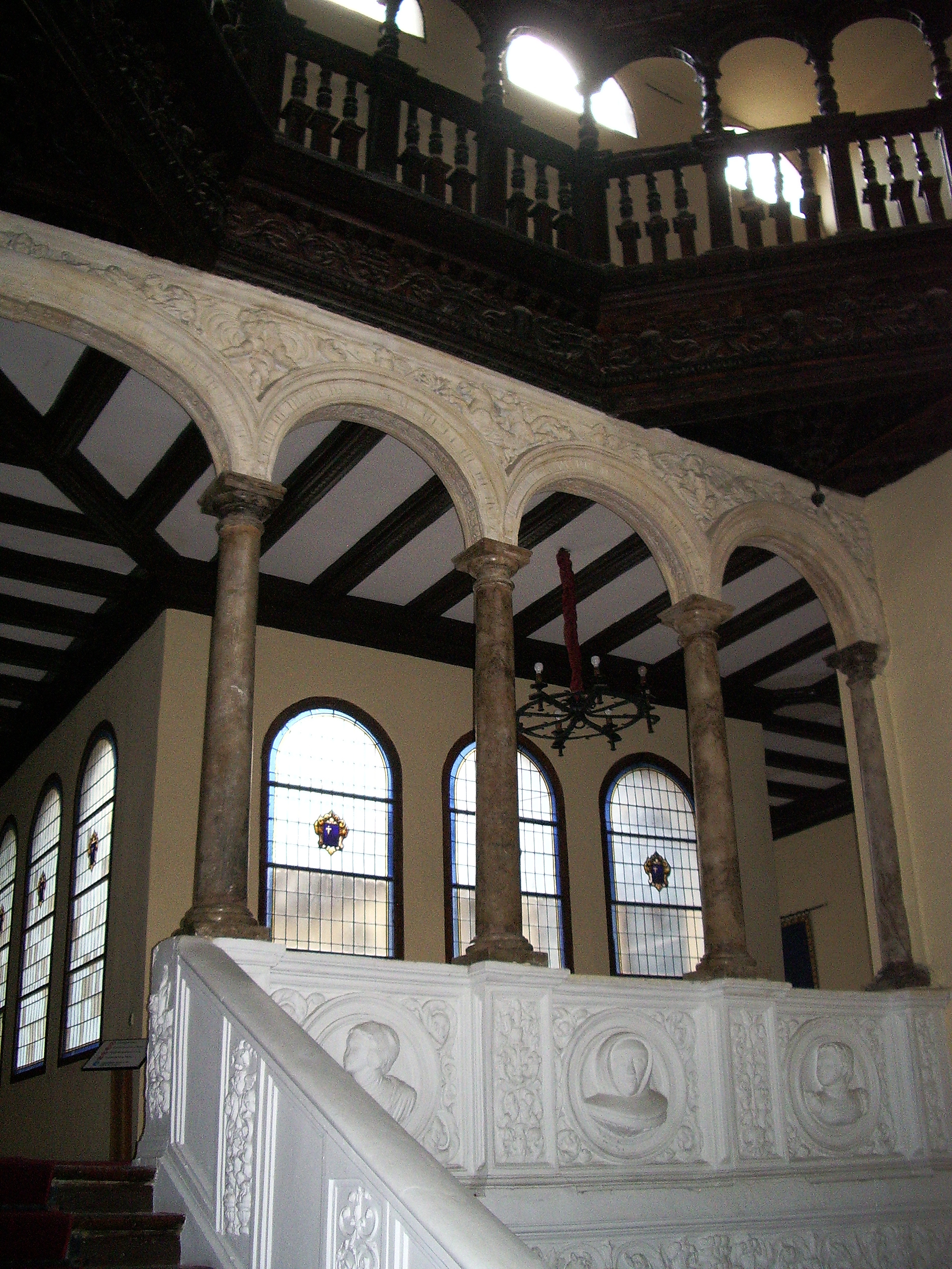 Interior casa de Miguel Donlope (Zaragoza)